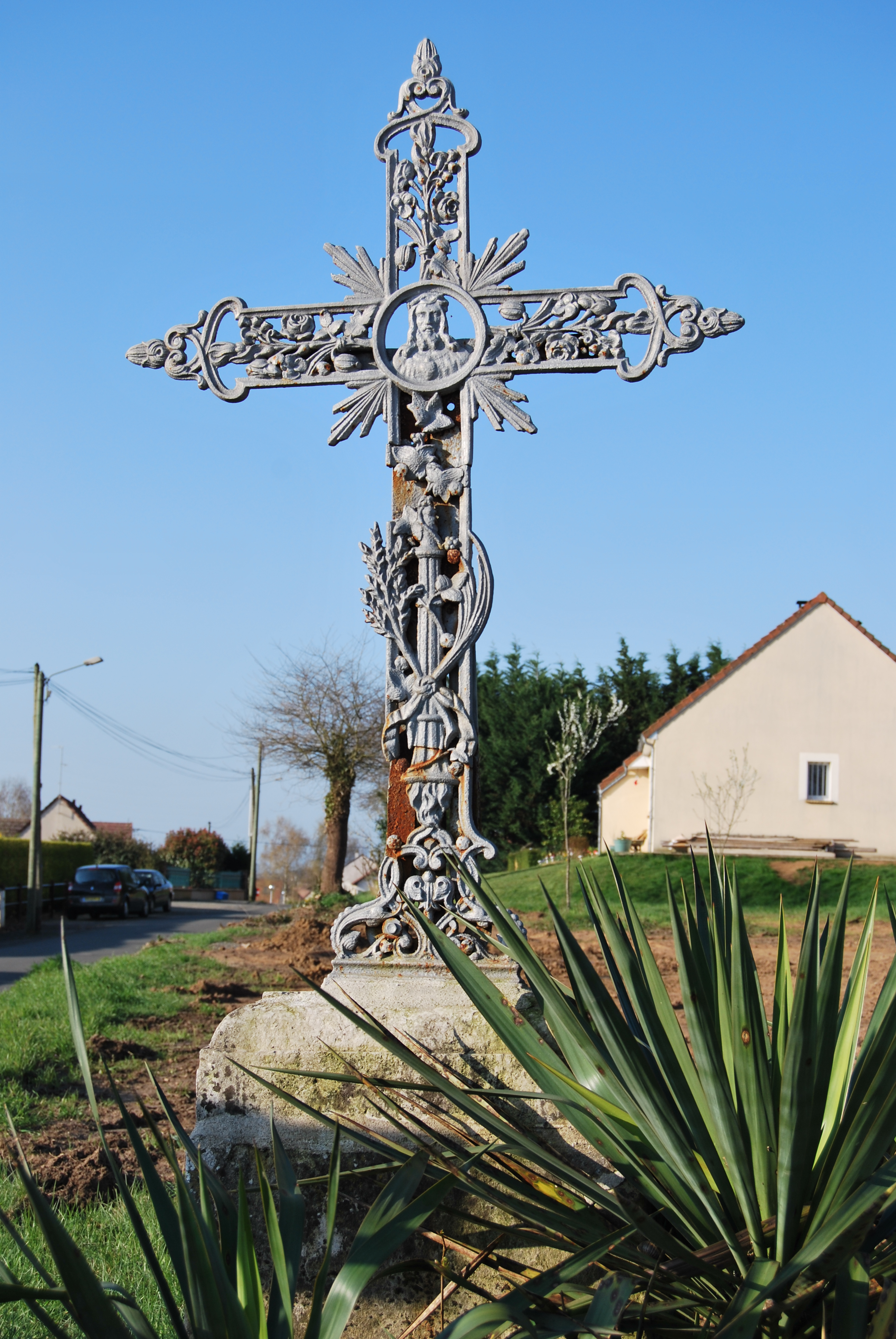 Croix Saint Apolline de Saint-Georges-du-Bois dans le département français de la Sarthe, en avril 2010.